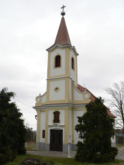 Keresztelő Szent János római katolikus templom Bögötén